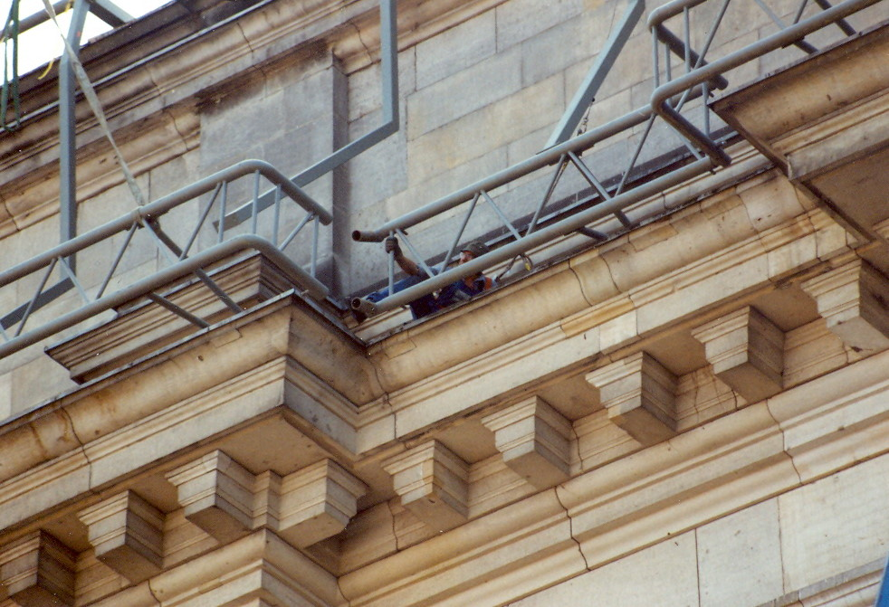 Beginn der Reichstagverhüllung